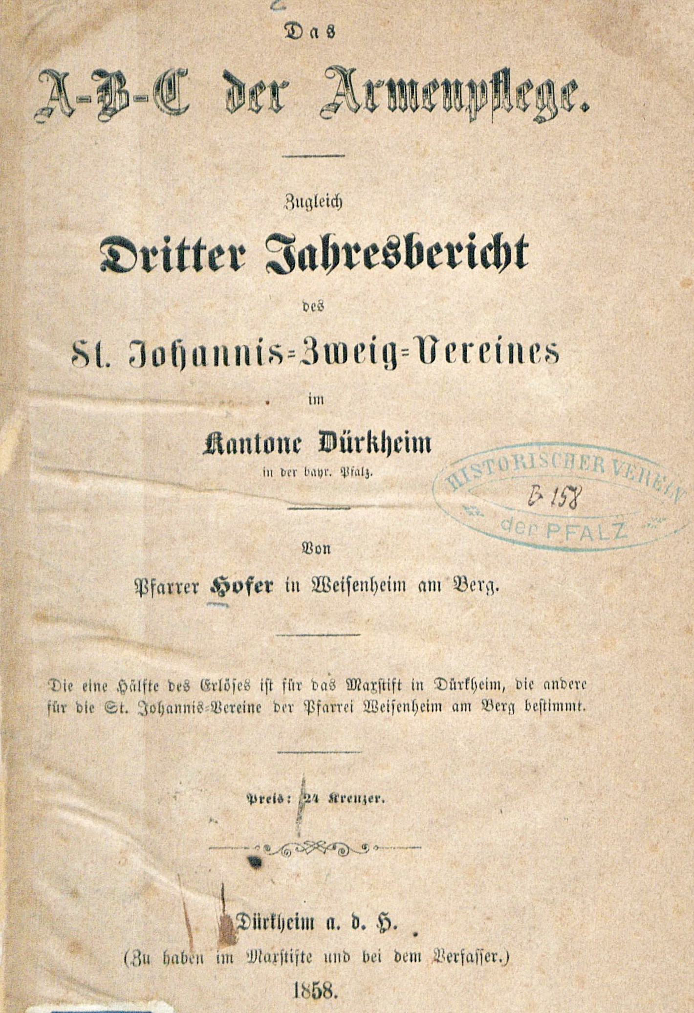 ABC der Armenpflege, von Pfarrer Hieronymus Hofer aus Grünstadt, Dürkheim, 1858